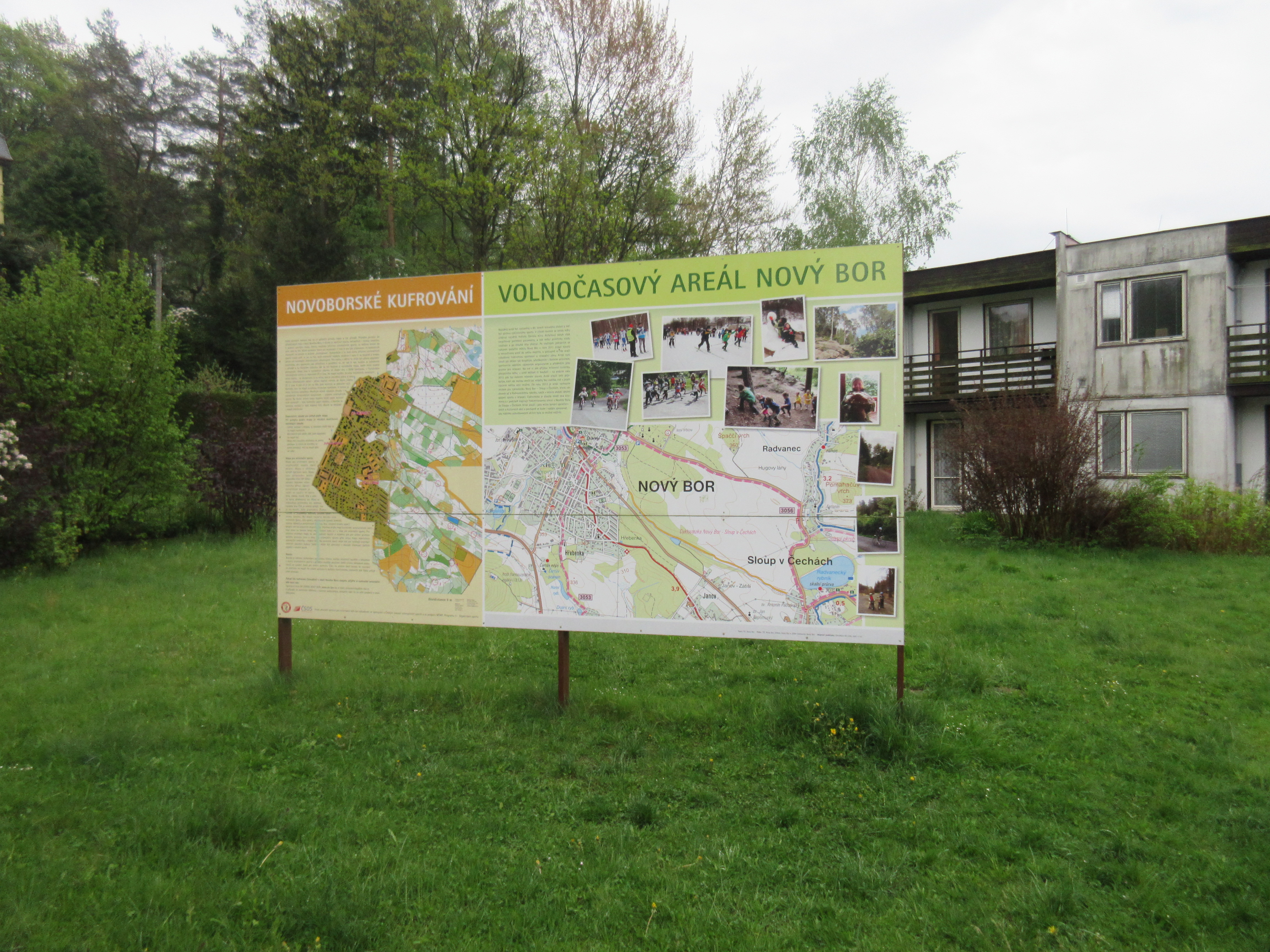 Cyklostezka vede přes cykloareál na okraji Nového Boru